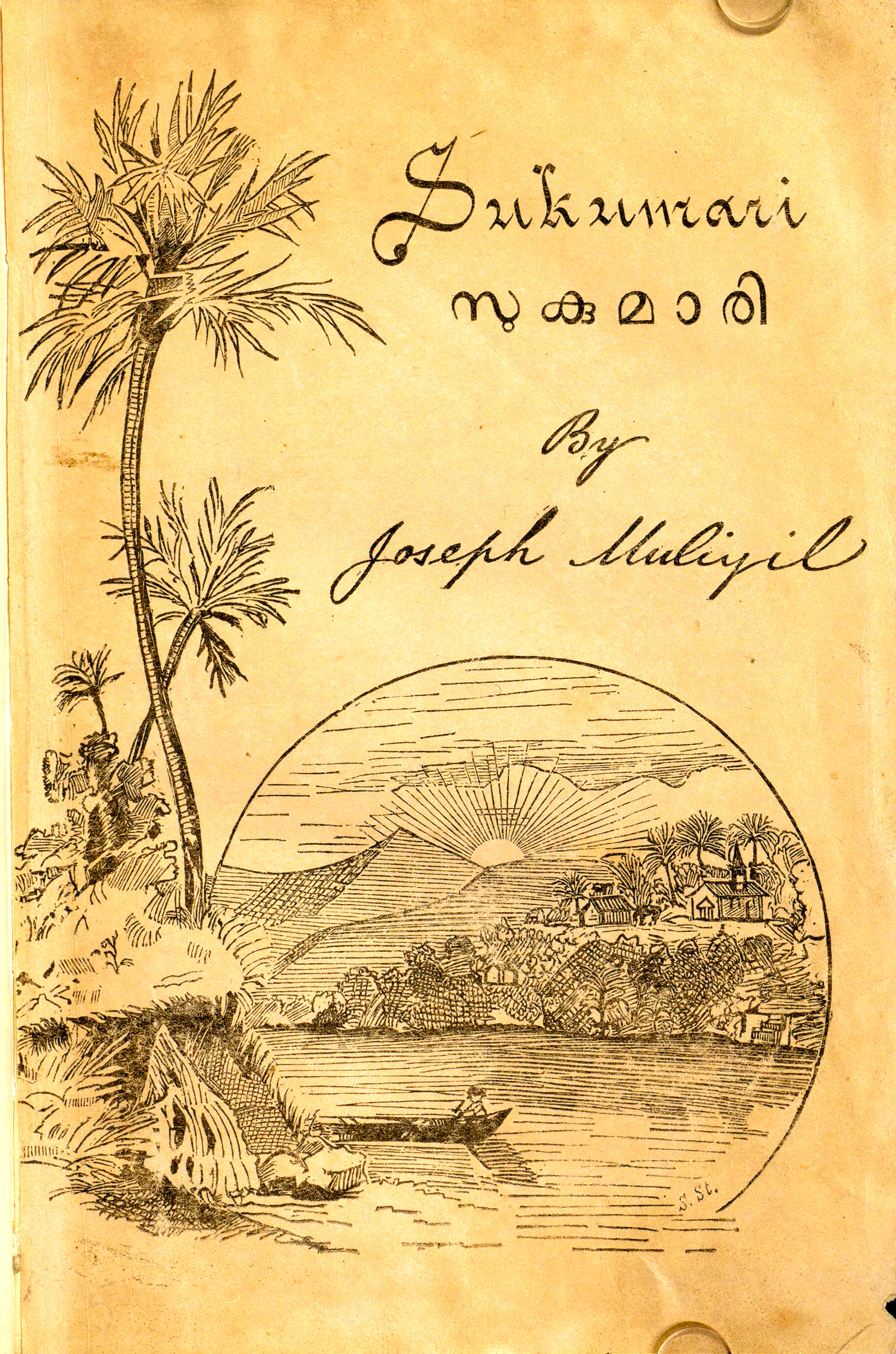 പേര്: സുകുമാരി, മലയാളജില്ലയിലെ ജർമ്മൻ മിശ്യൻ വേലയുടെ ആരംഭകാലത്തെ വർണ്ണിക്കുന്ന ഒരു കഥ